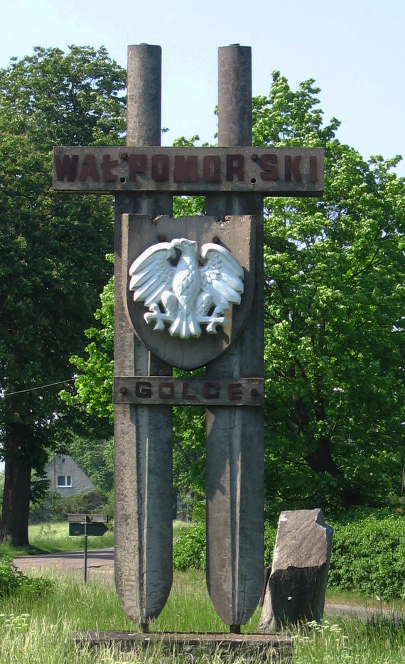 Upamiętnienie walk na Wale Pomorskim we wsi Golce w zachodniopomorskim